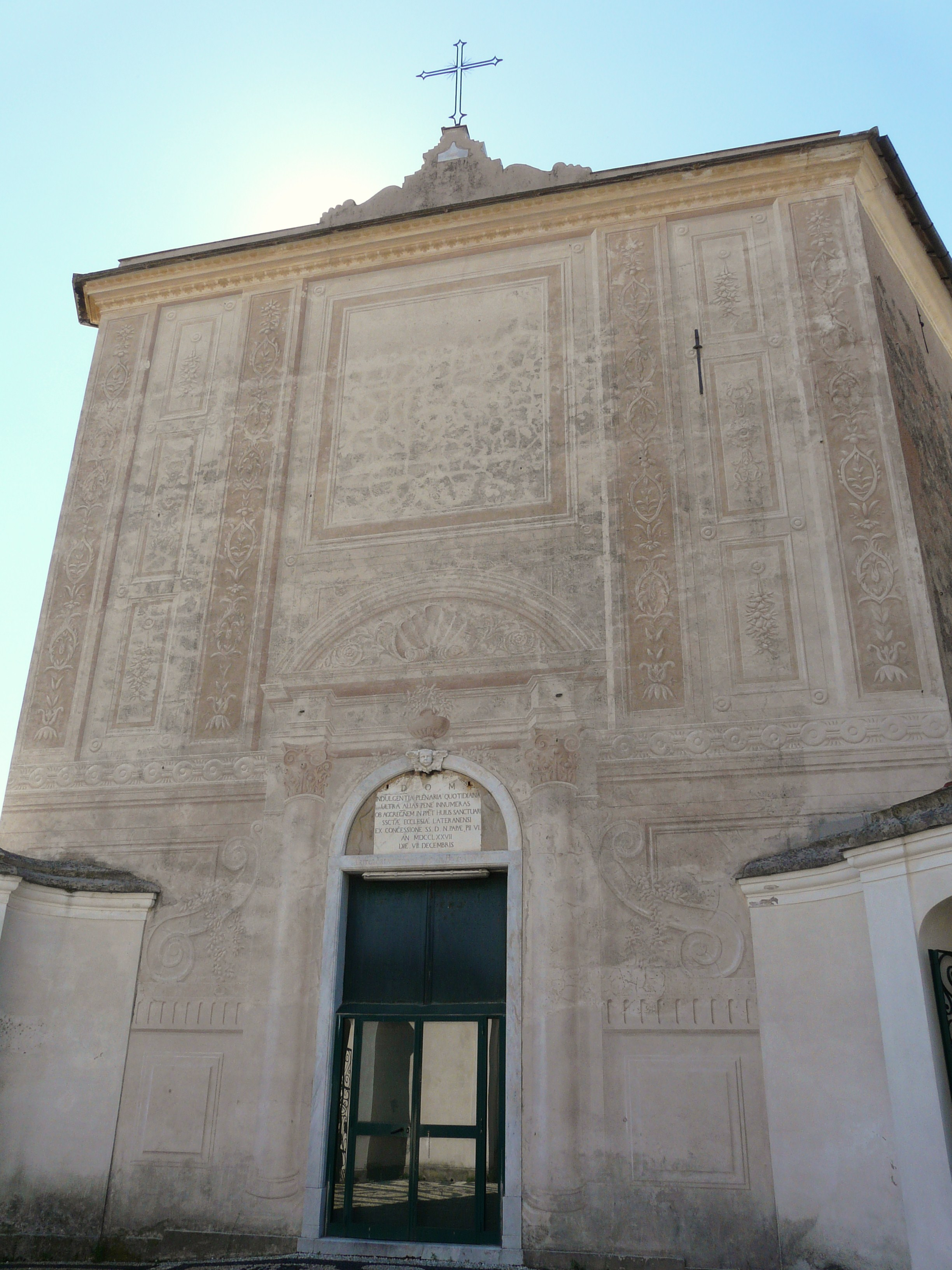 Facciata del santuario della Madonnetta, Genova, Liguria, Italia